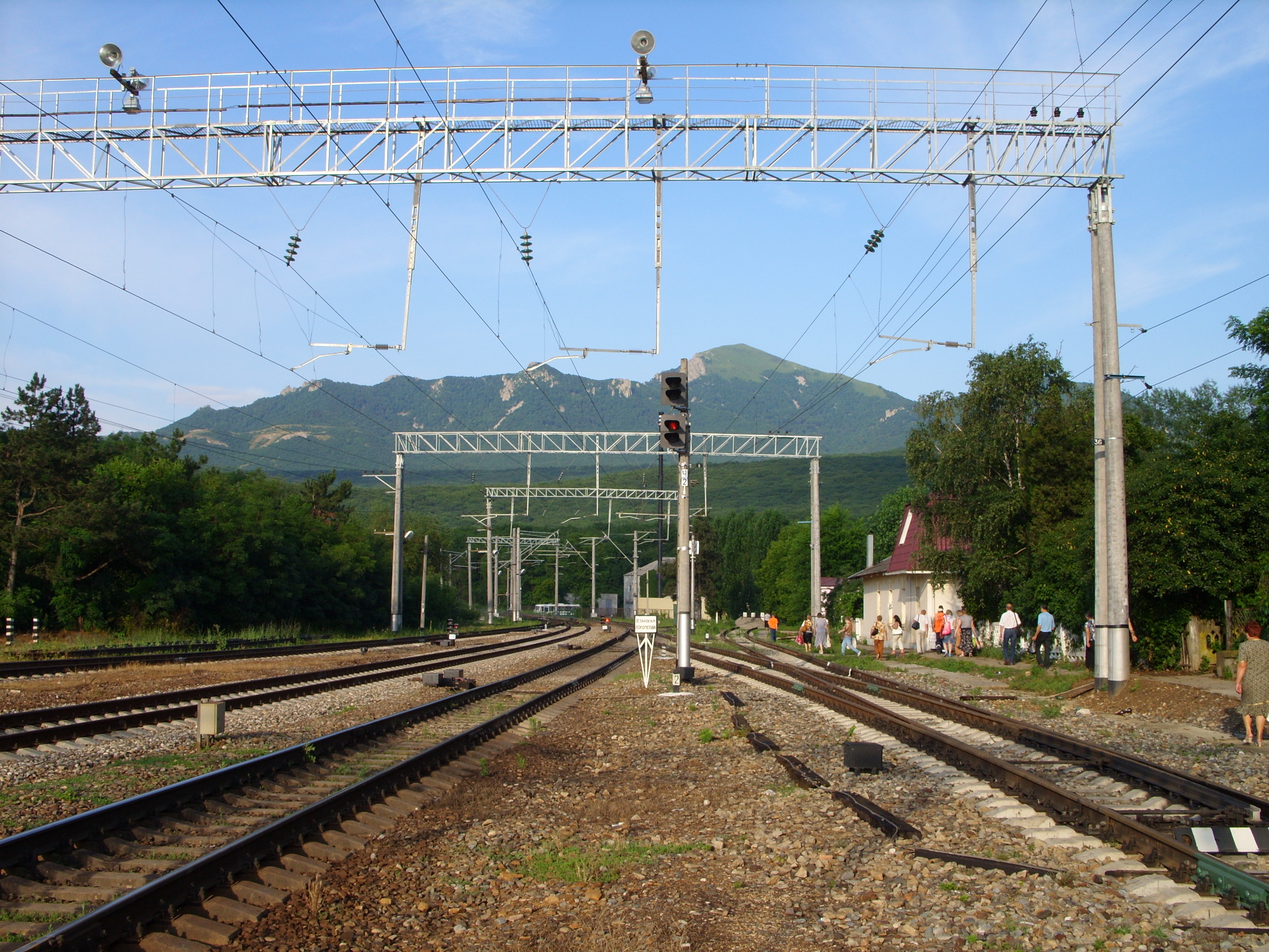 снимок июля 2009 г.